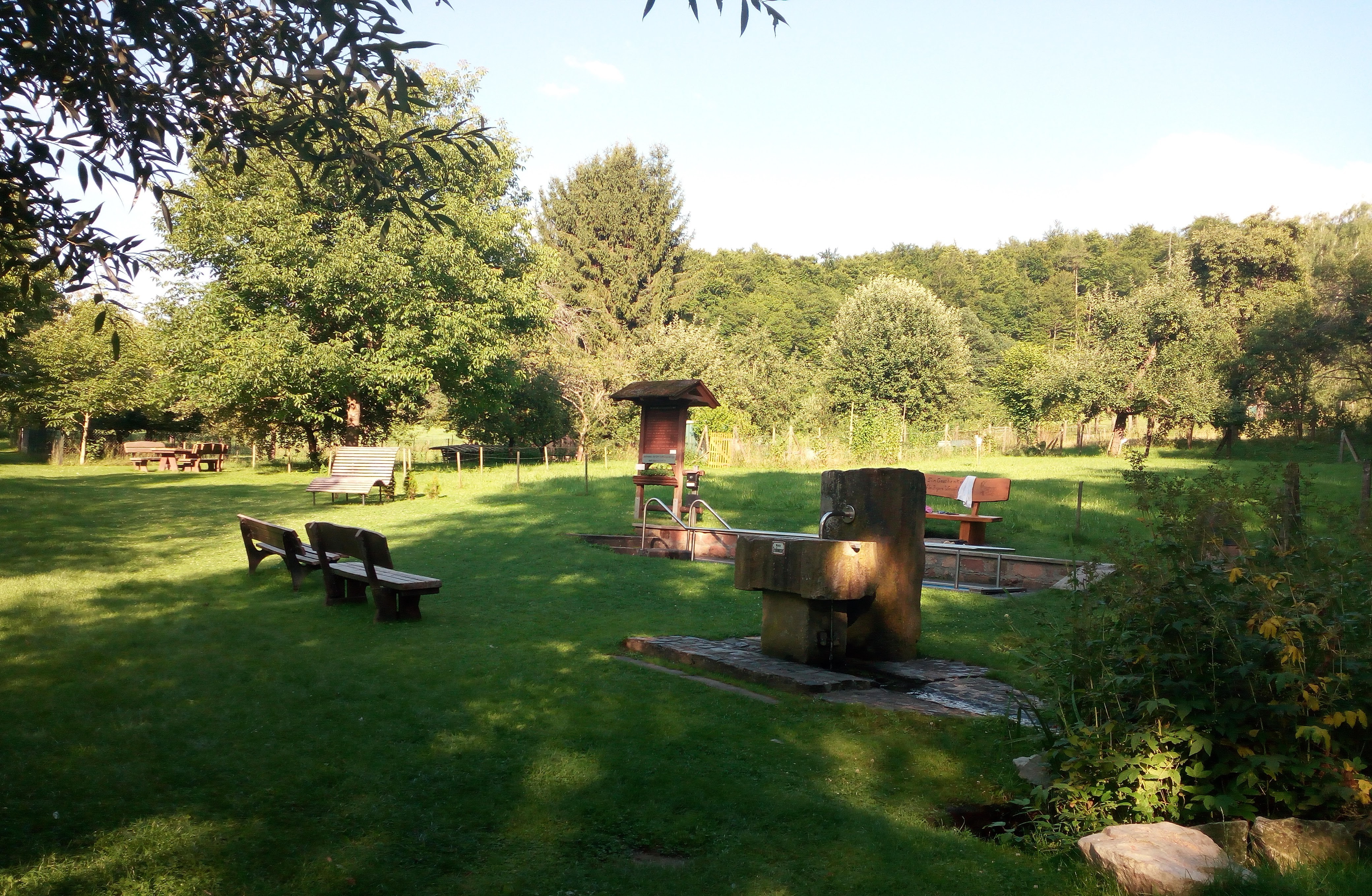 Rast –und Erfrischungsplatz für Wanderer und Radfahrer am Vulkanradweg.